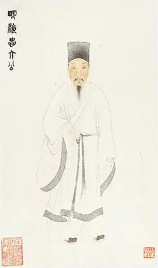 海瑞（1514年1月22日－1587年11月13日），字汝賢，又字國開，號剛峰，廣東瓊山（今海南海口）人，祖籍廣東番禺，明朝政治人物、思想家，舉人出身。